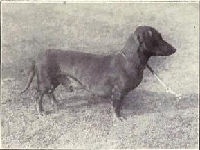 Dachshund from 1915